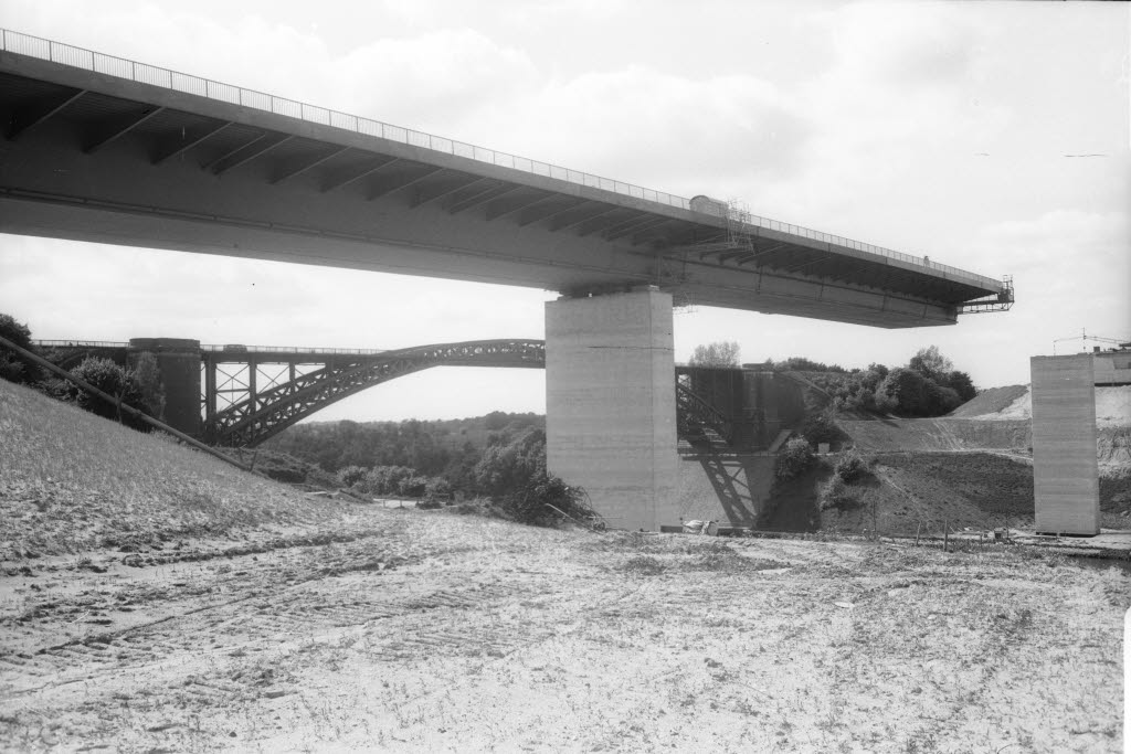 Im Hintergrund die (alte) Levensauer Hochbrücke.